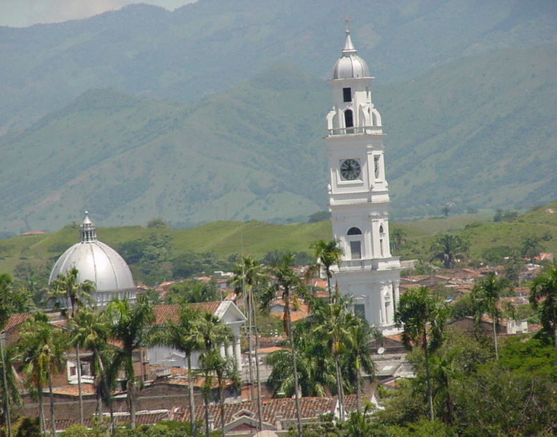 Panoramica